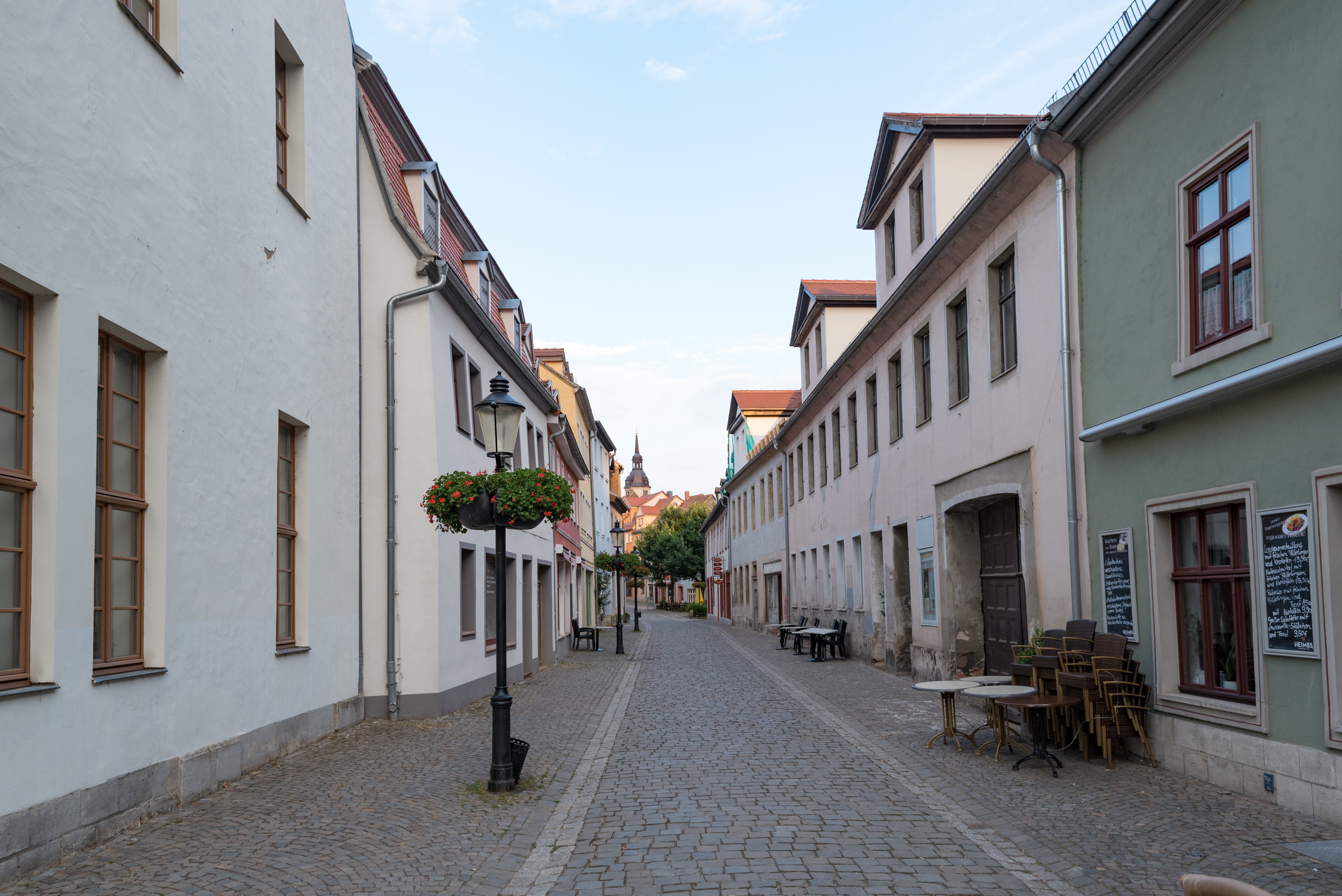 Naumburg (Saale), Steinweg, von Westen